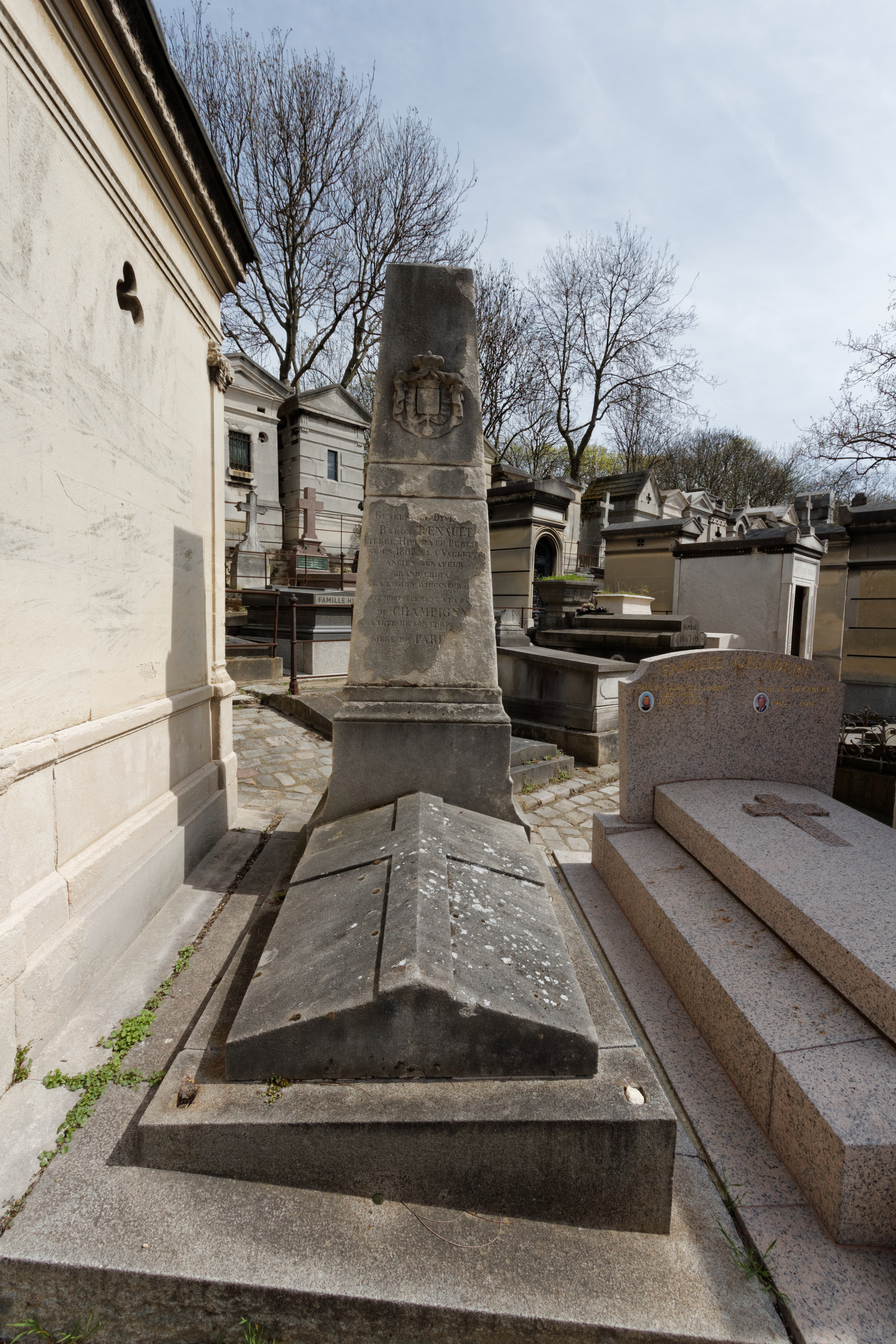 Sépulture de Pierre Hippolyte Publius Renault (1807-1870) en forme d'obélisque